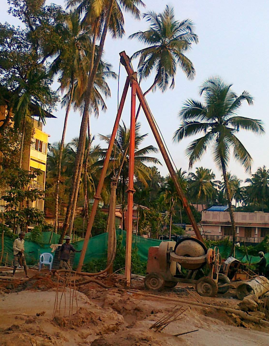 DMC (Direct Mud Circulation) സാങ്കേതിക വിദ്യ ഉപയോഗിച്ച് പൈൽ നിർമിക്കാൻ ഉപയോഗിക്കുന്ന മുക്കാലി(Tripod)